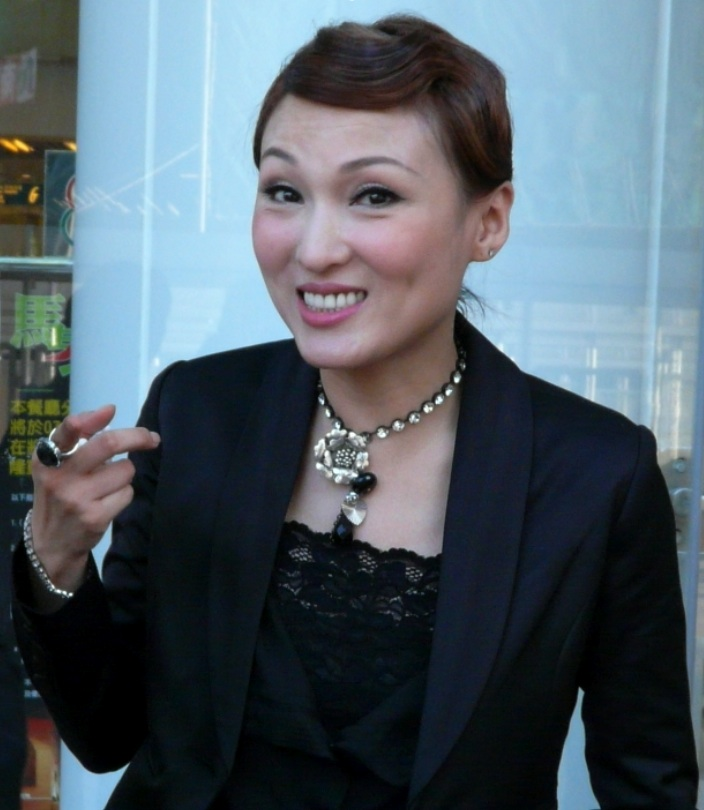 李蕙敏